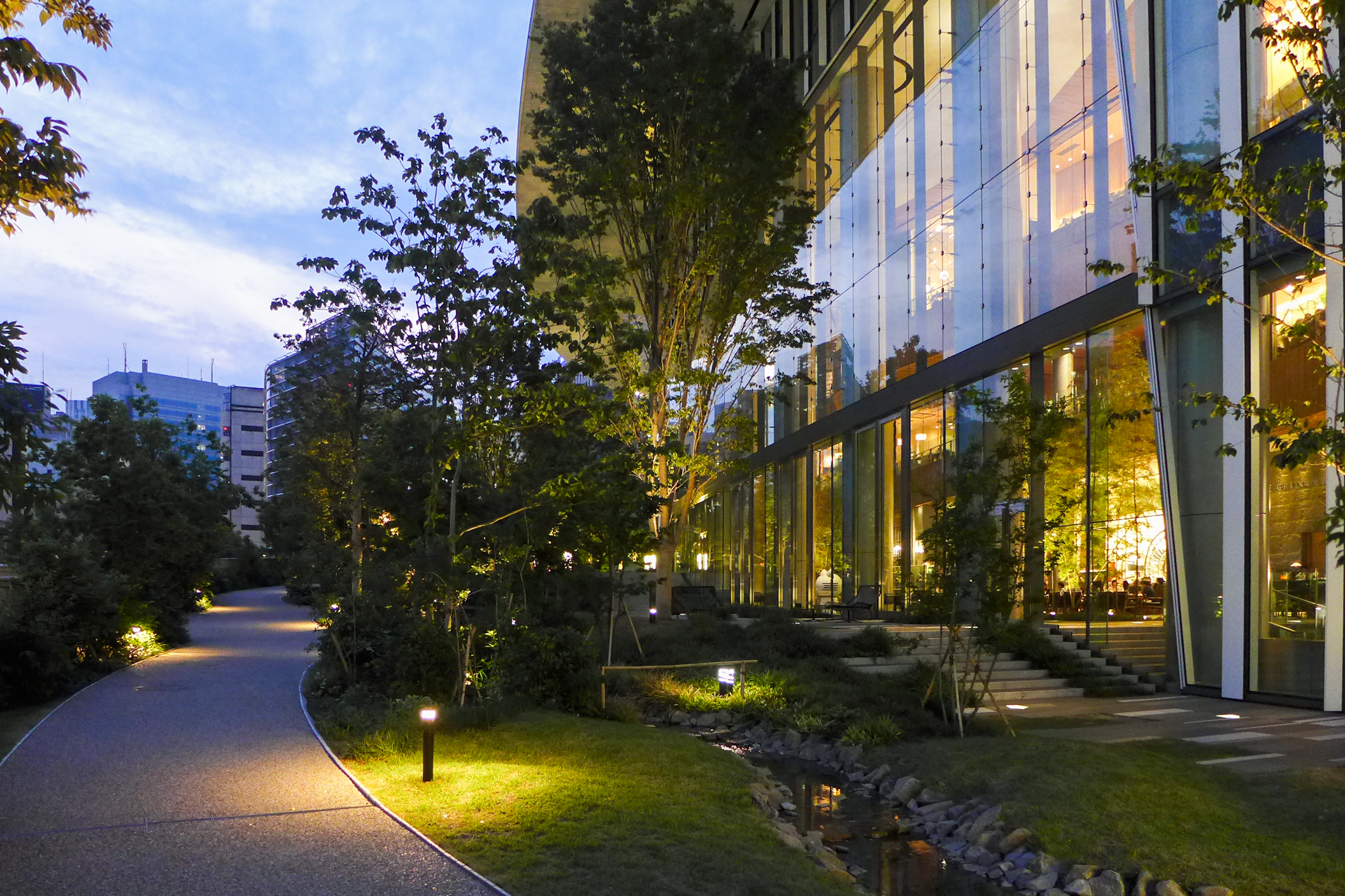 Toranomon Hills Step Garden dusk view